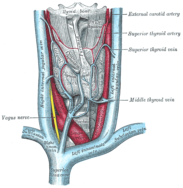 Thyroid gland